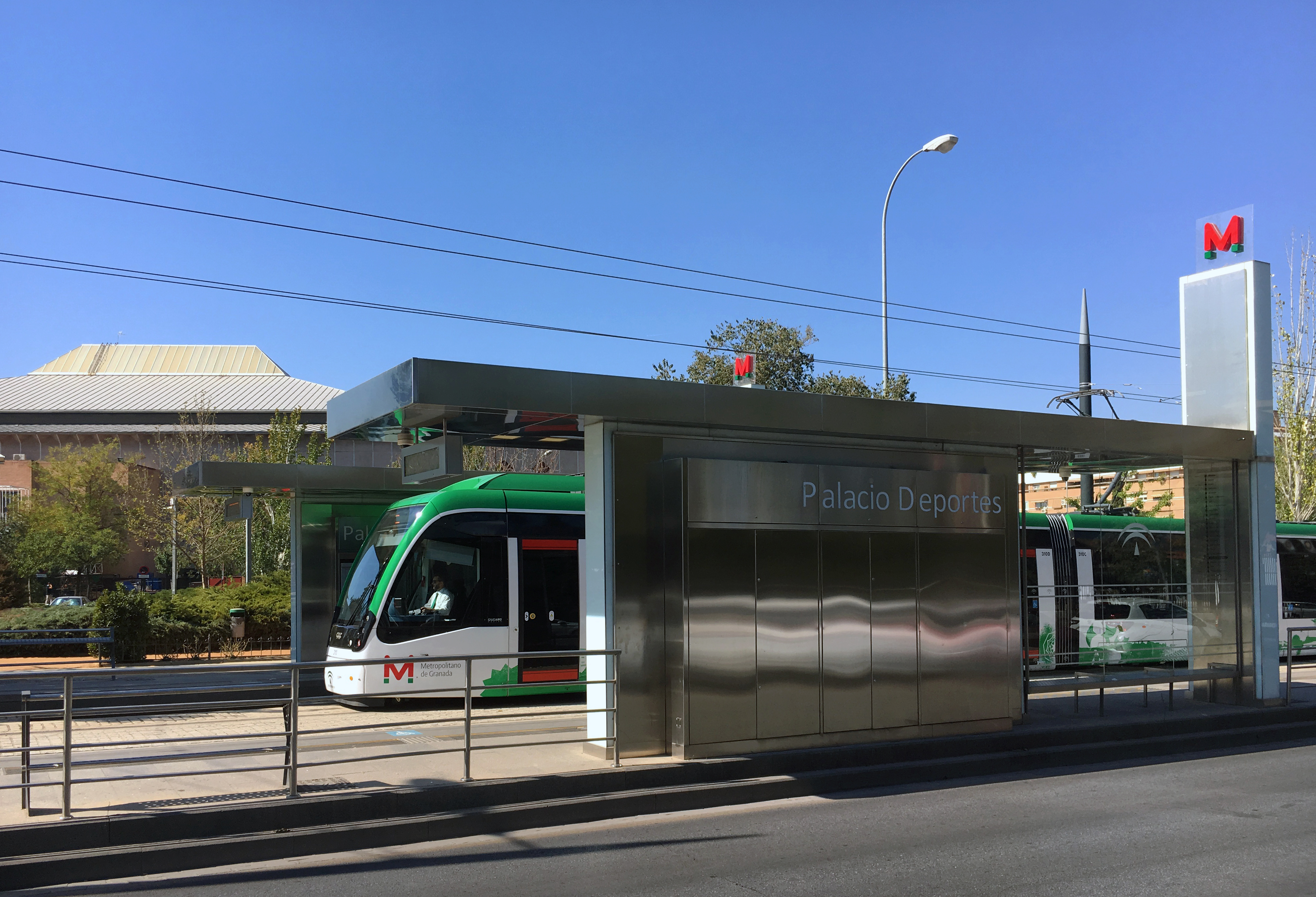 Estación del Palacio de los Deportes del Metro de Granada